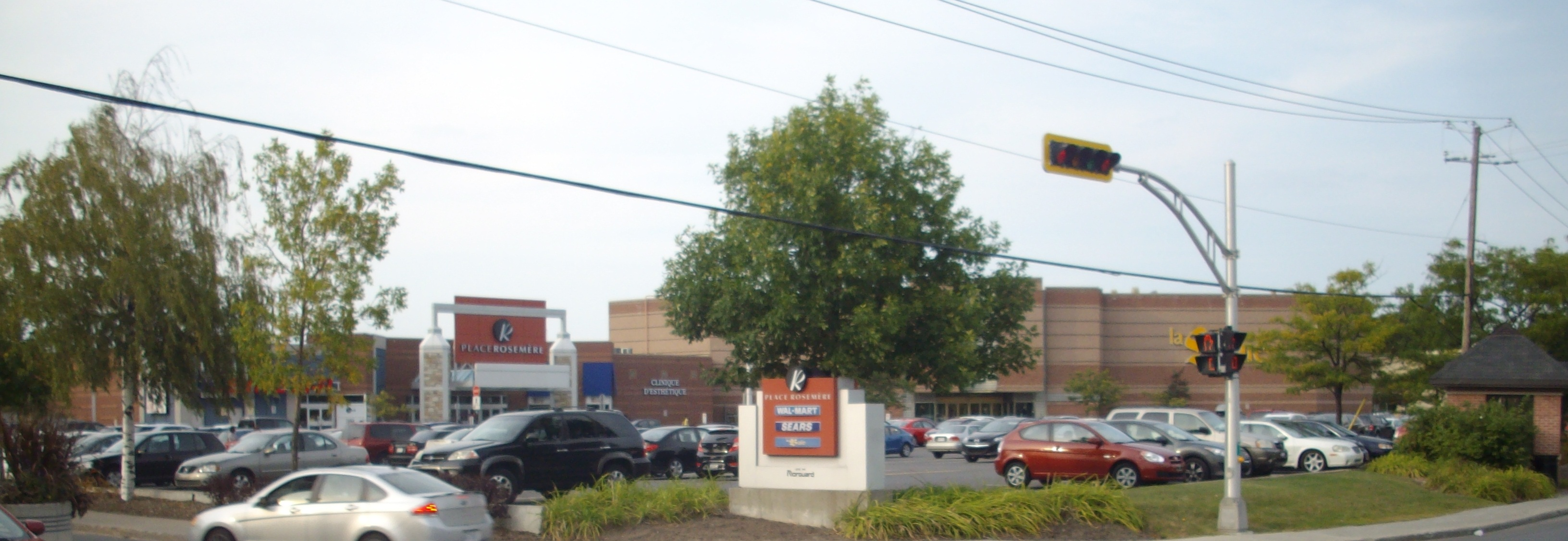 Place Rosemère photographed in Rosemère, Quebec, Canada.